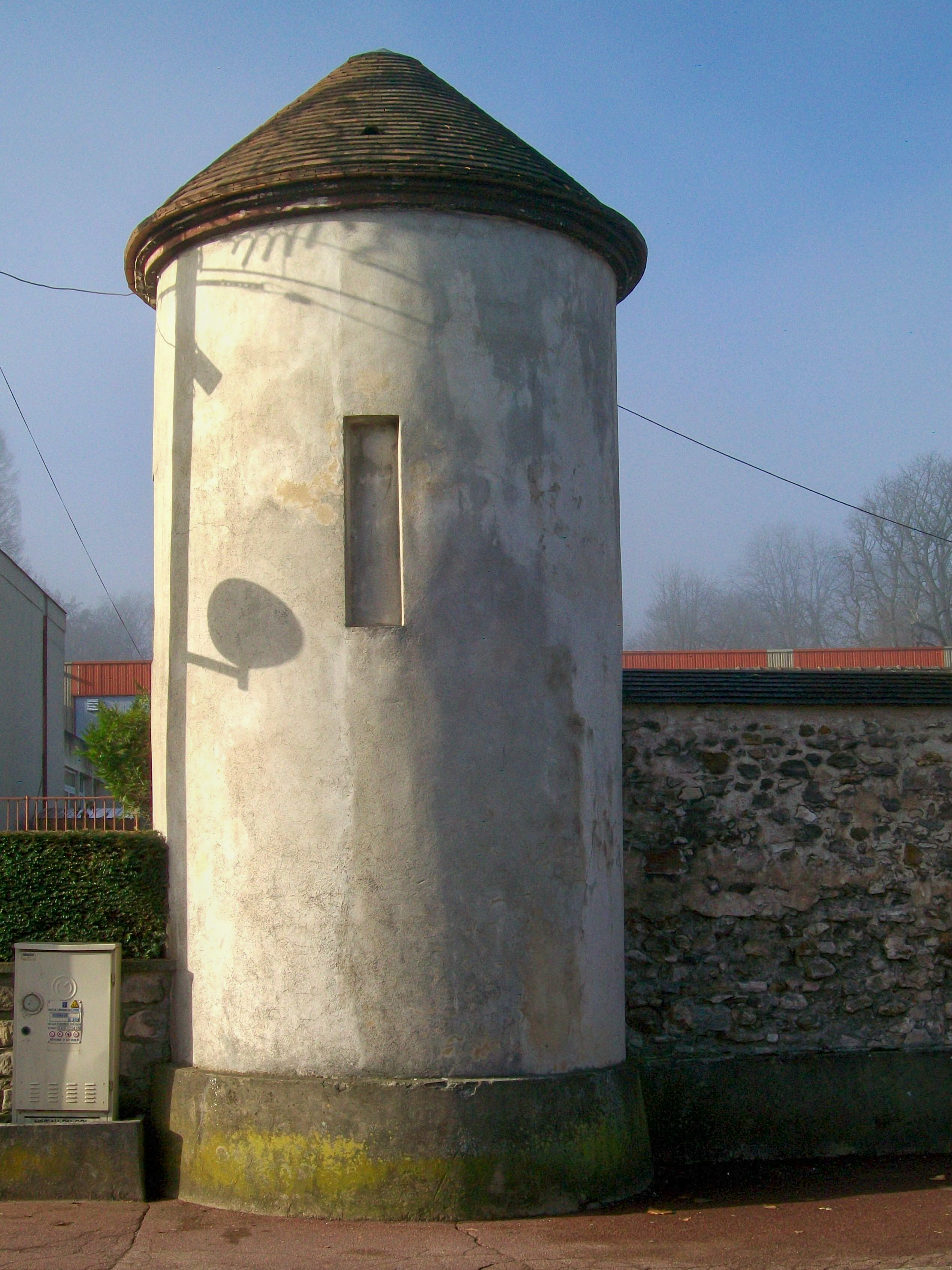 Tourelle à Survilliers (95), non datée, associée à la ferme Seigneuriale disparue à la Révolution.